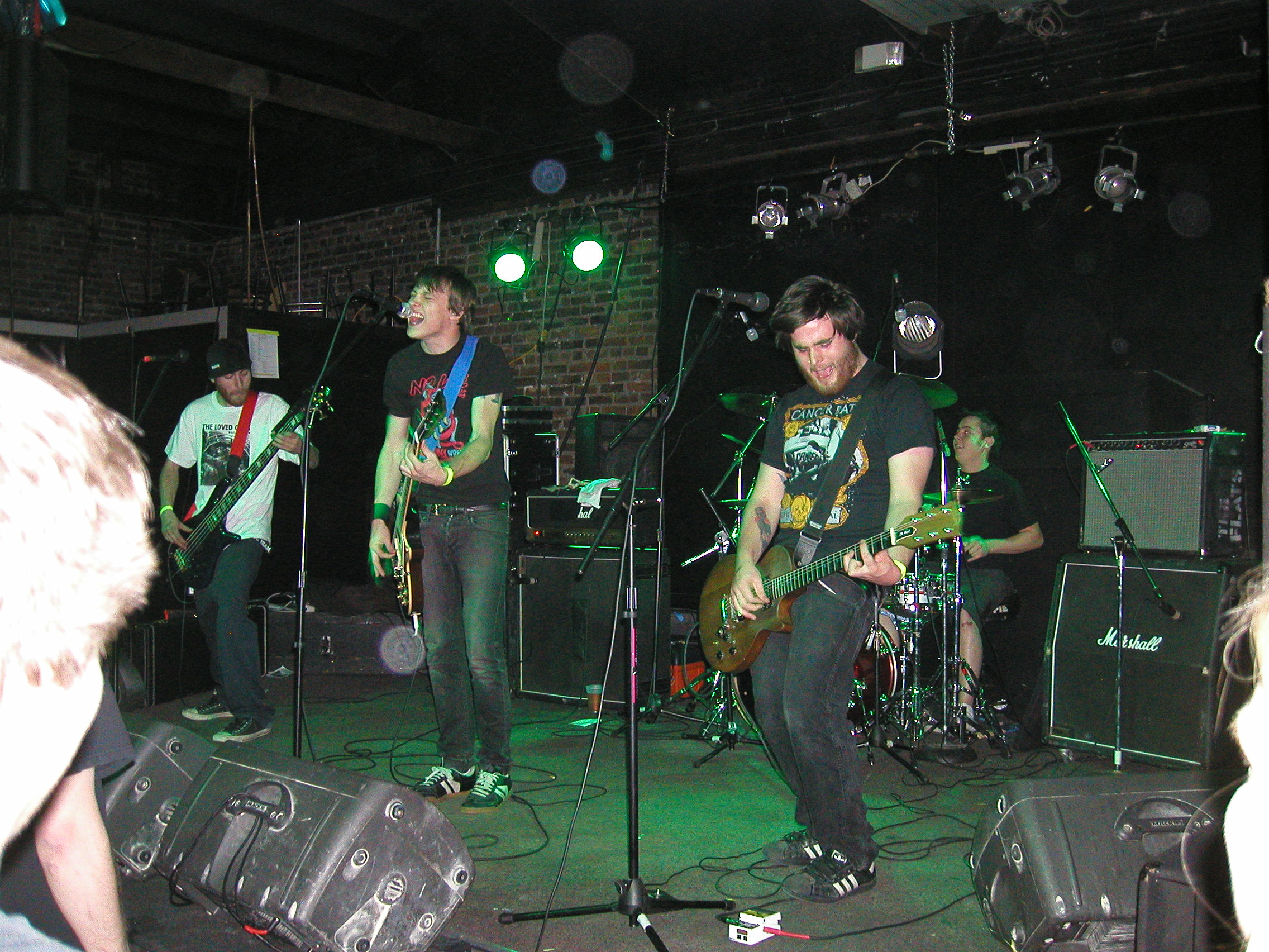 The Flatliners en gira en 2008